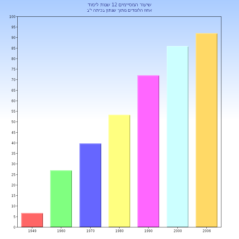 דיאגרמה - שיעור המסיימים 12 שנות לימוד